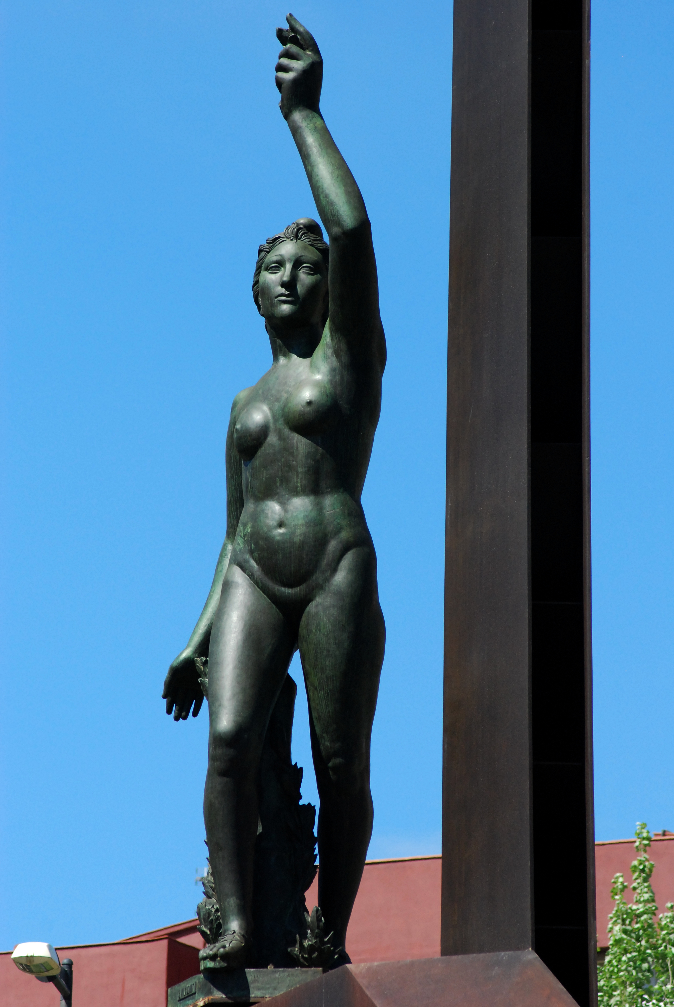 La República (Josep Viladomat). Pl. Llucmajor (Barcelona)